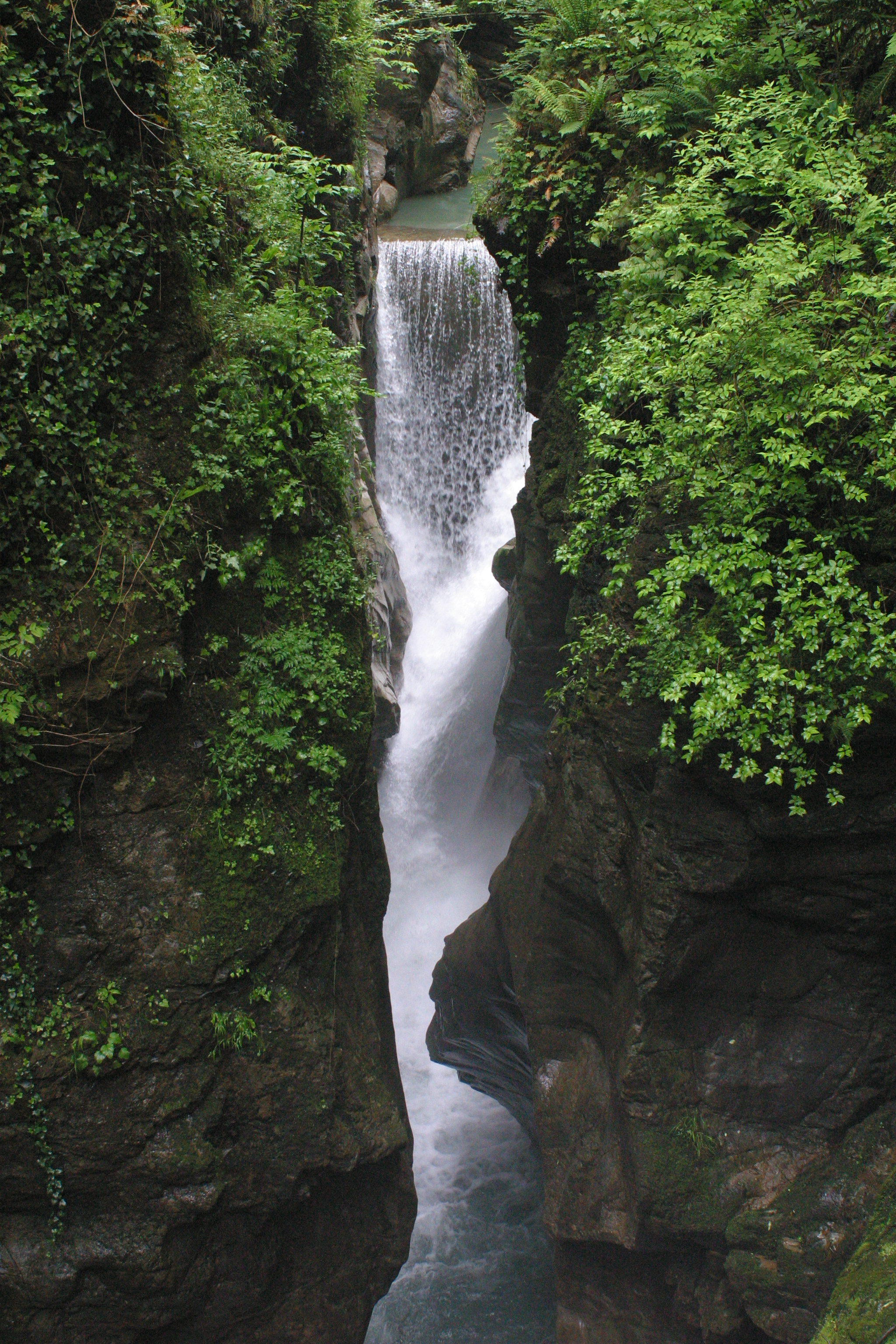 Farini, Province of Piacenza, Italy